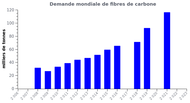 Demande mondiale de fibres de carbones (données extraites de T. Kraus, M. Kühnel, E. Witten 'Composite Market Report 2015' Carbon Composites